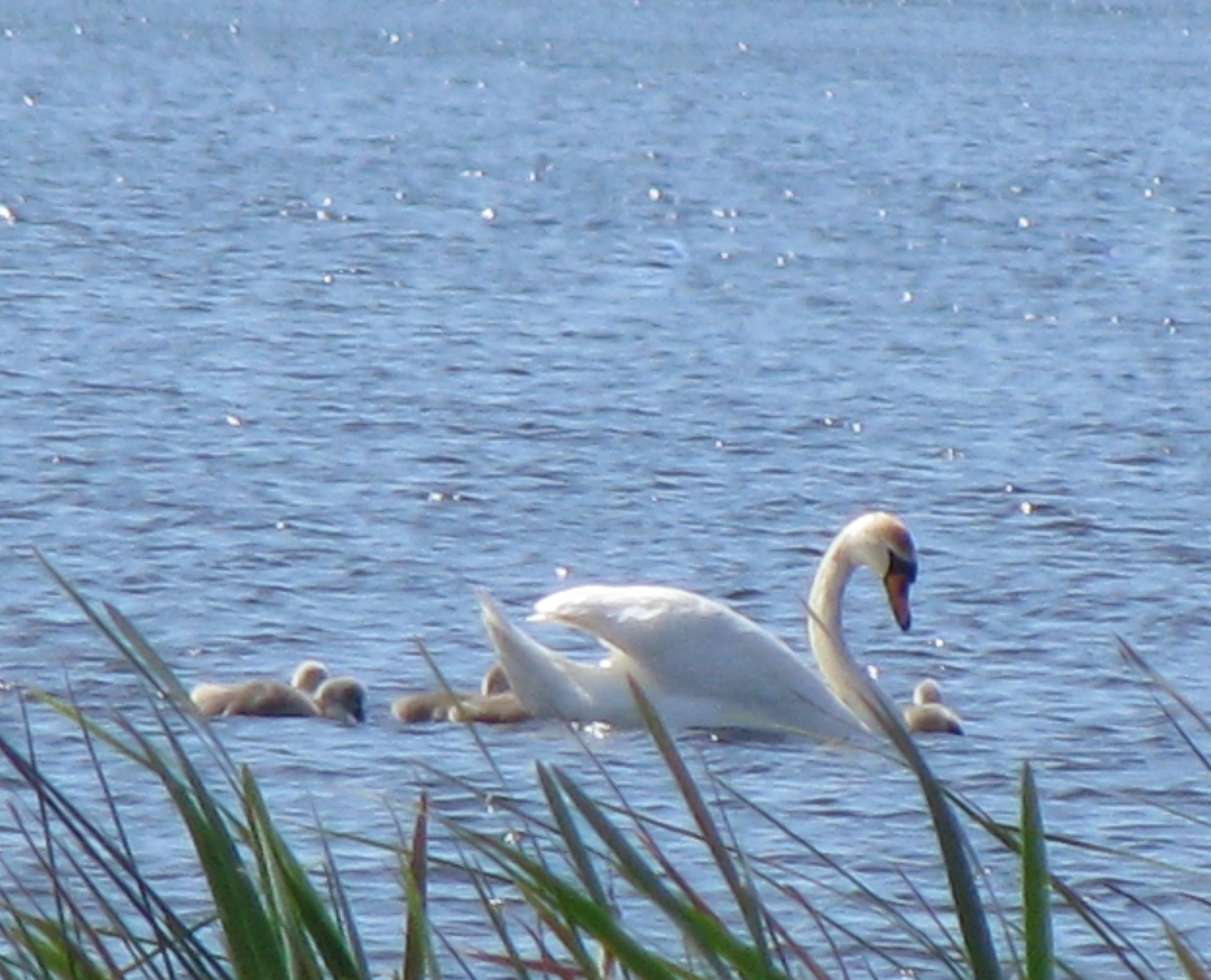 Kühmnokk-luiged Piirissaarel